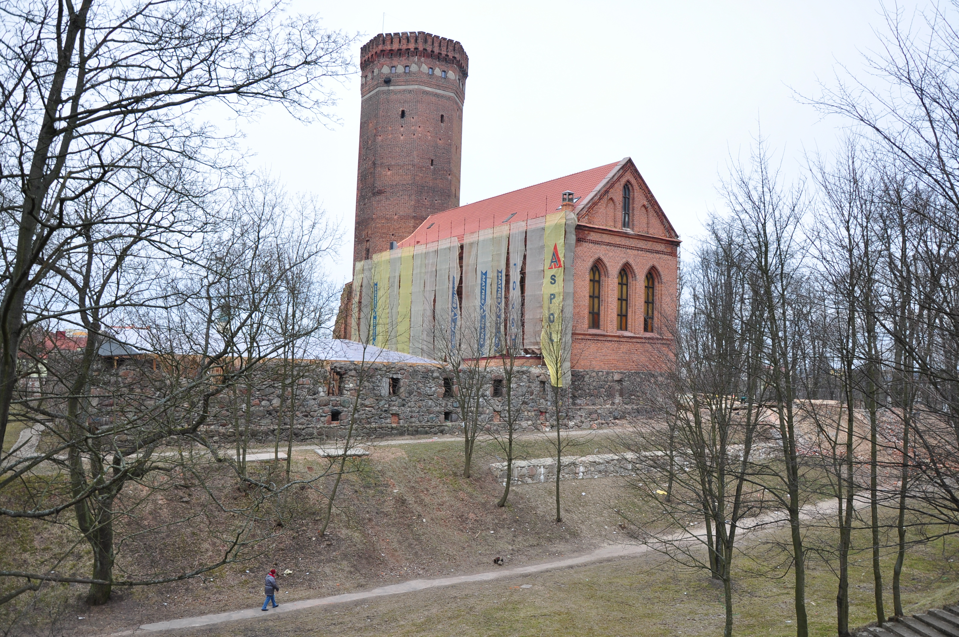 Zamek w Człuchowie.